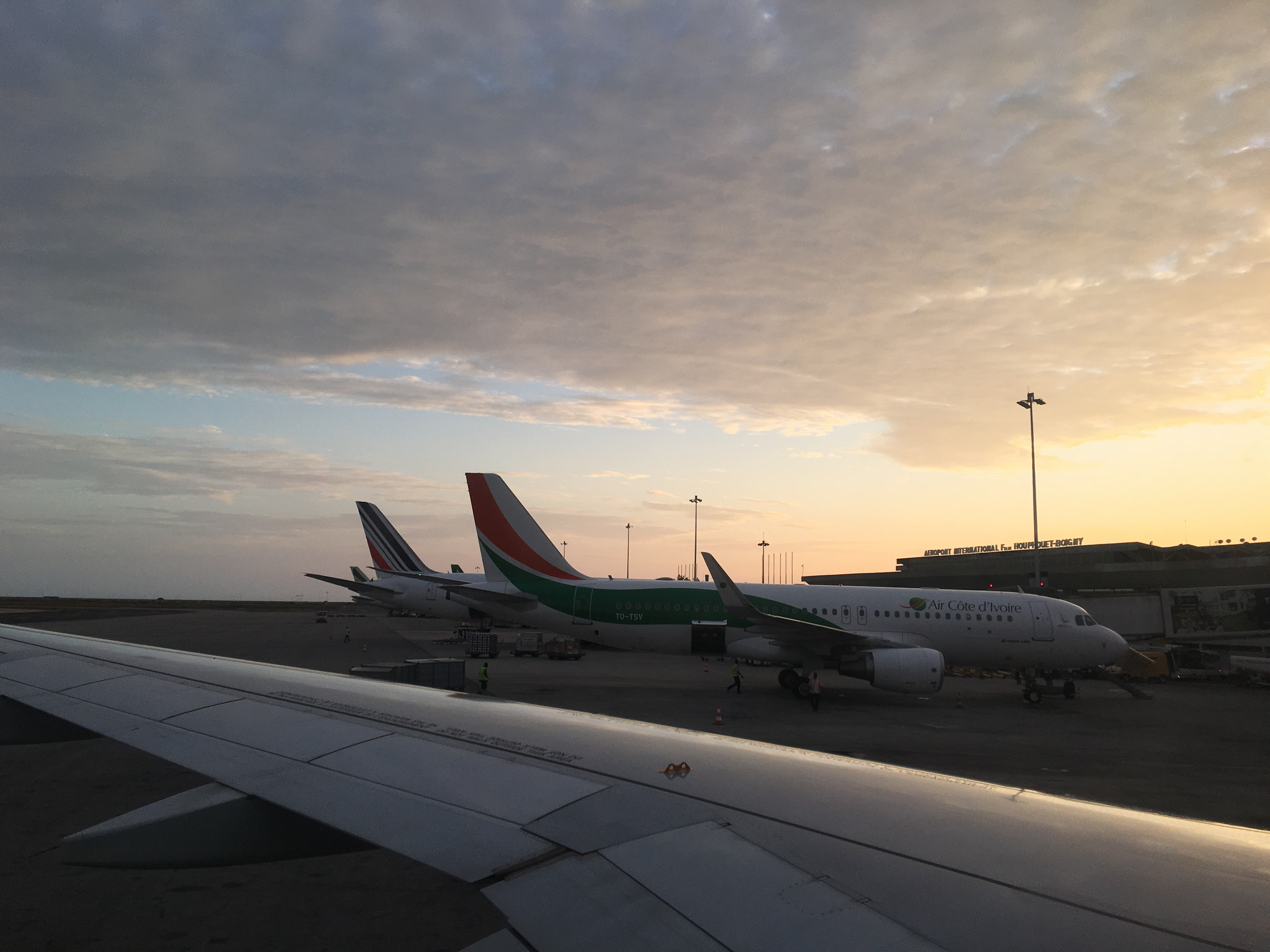 Airbus A320 de la compagnie Air Côte d'Ivoire à l'Aéroport International Félix HOUPHOUET-BOIGNY